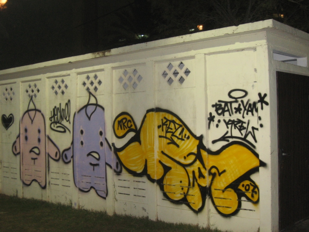 ציור גרפיטי על גבי מבנה שירותים ציבוריים בבת-ים, ישראל צולם ע"י זיו מזרחי ב-13.01.2007